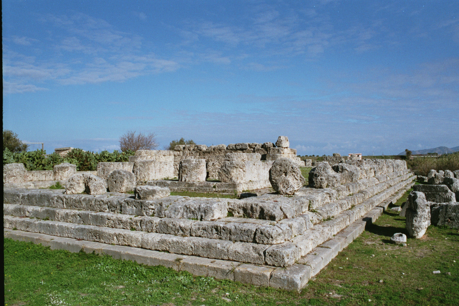 Tempio della Vittoria, Himera